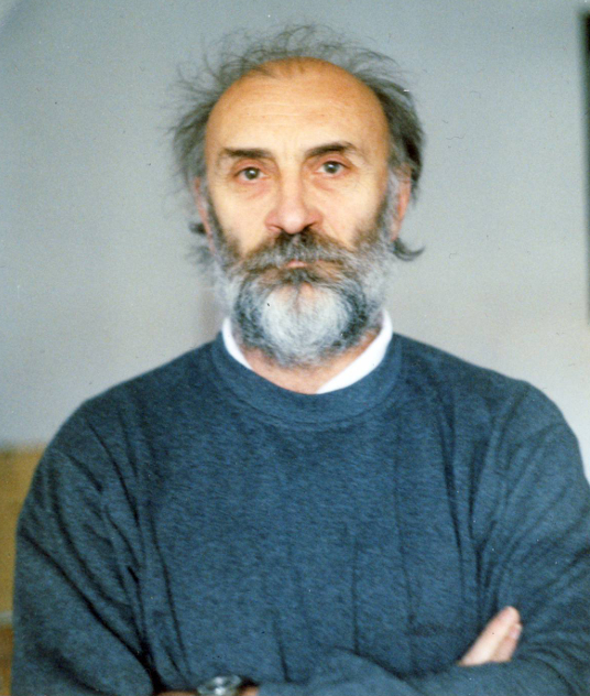 Branko Andrić Porträt